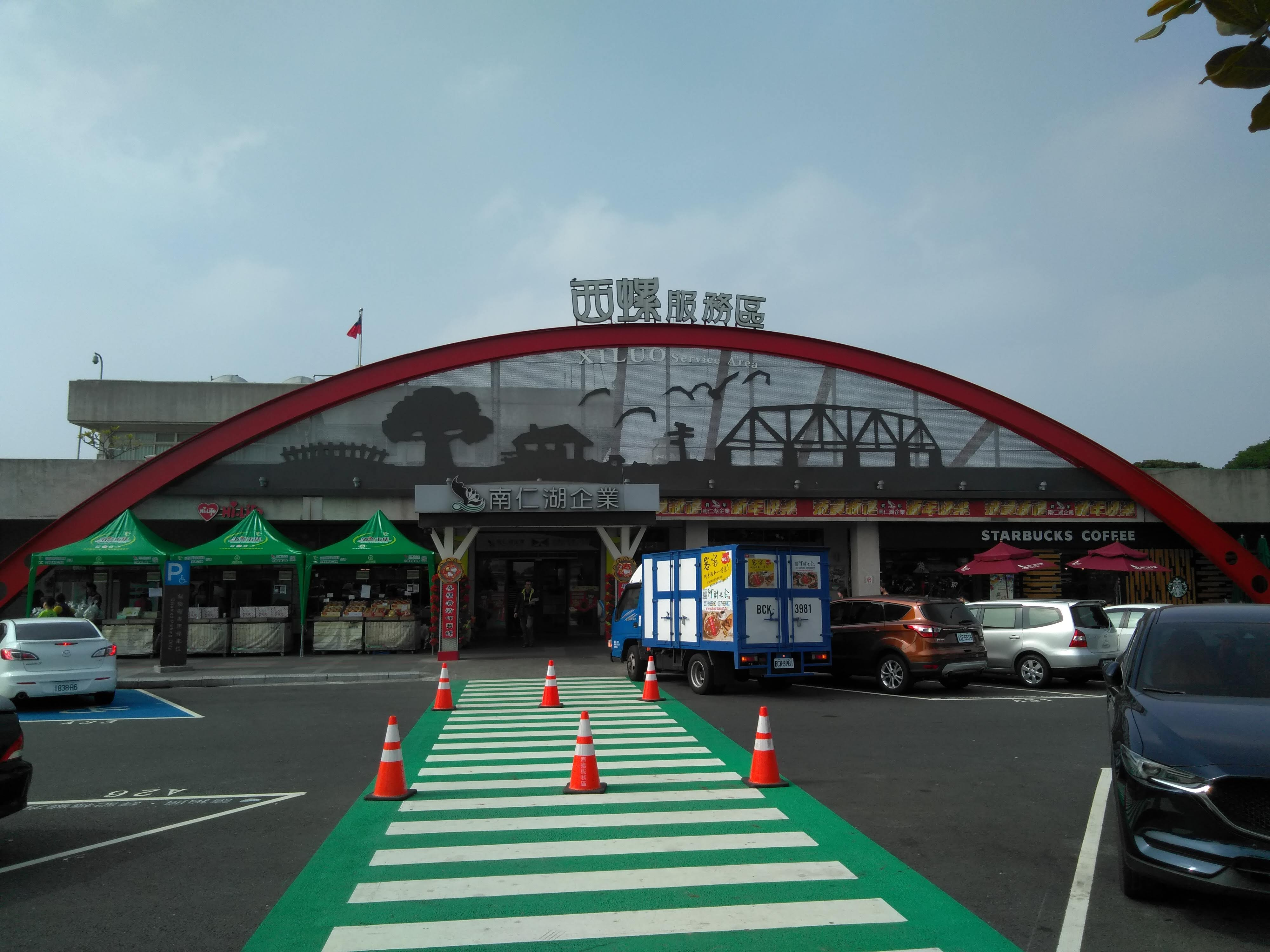 西螺服務區 新整建門口